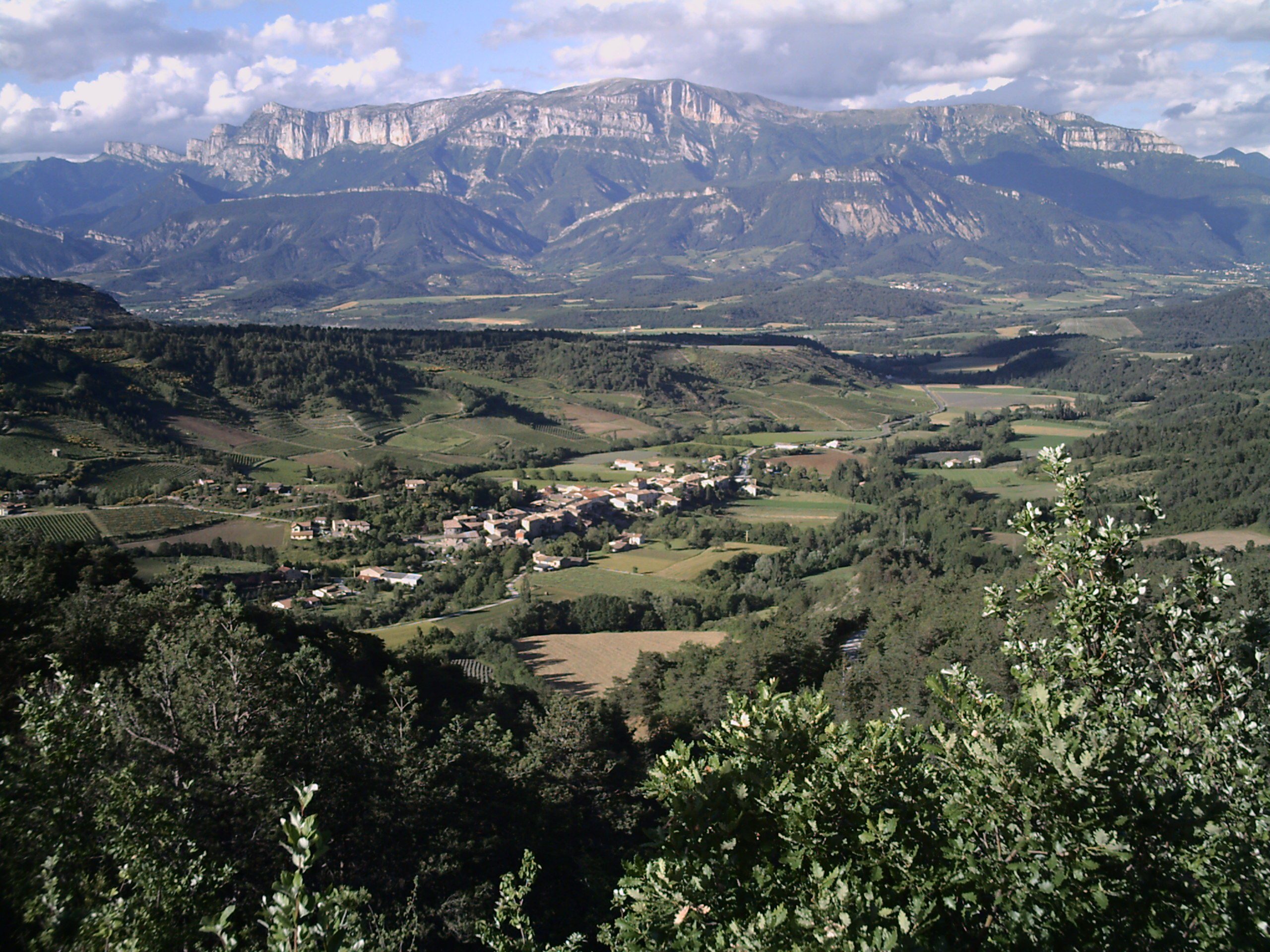 Vue d'ensemble du vallon de Barnave, face au Glandasse.